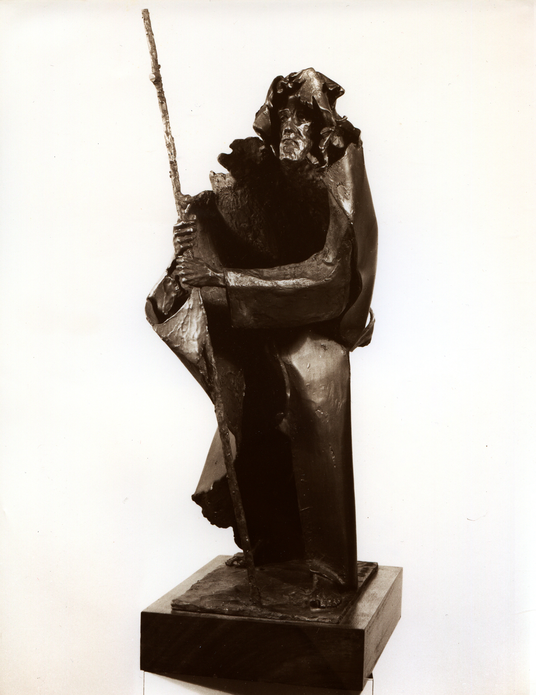 "El caminante", por Rafael Pi Belda. Año: 1980. Tamaño: 85cm de alto. Material: bronce. Colección del artista.